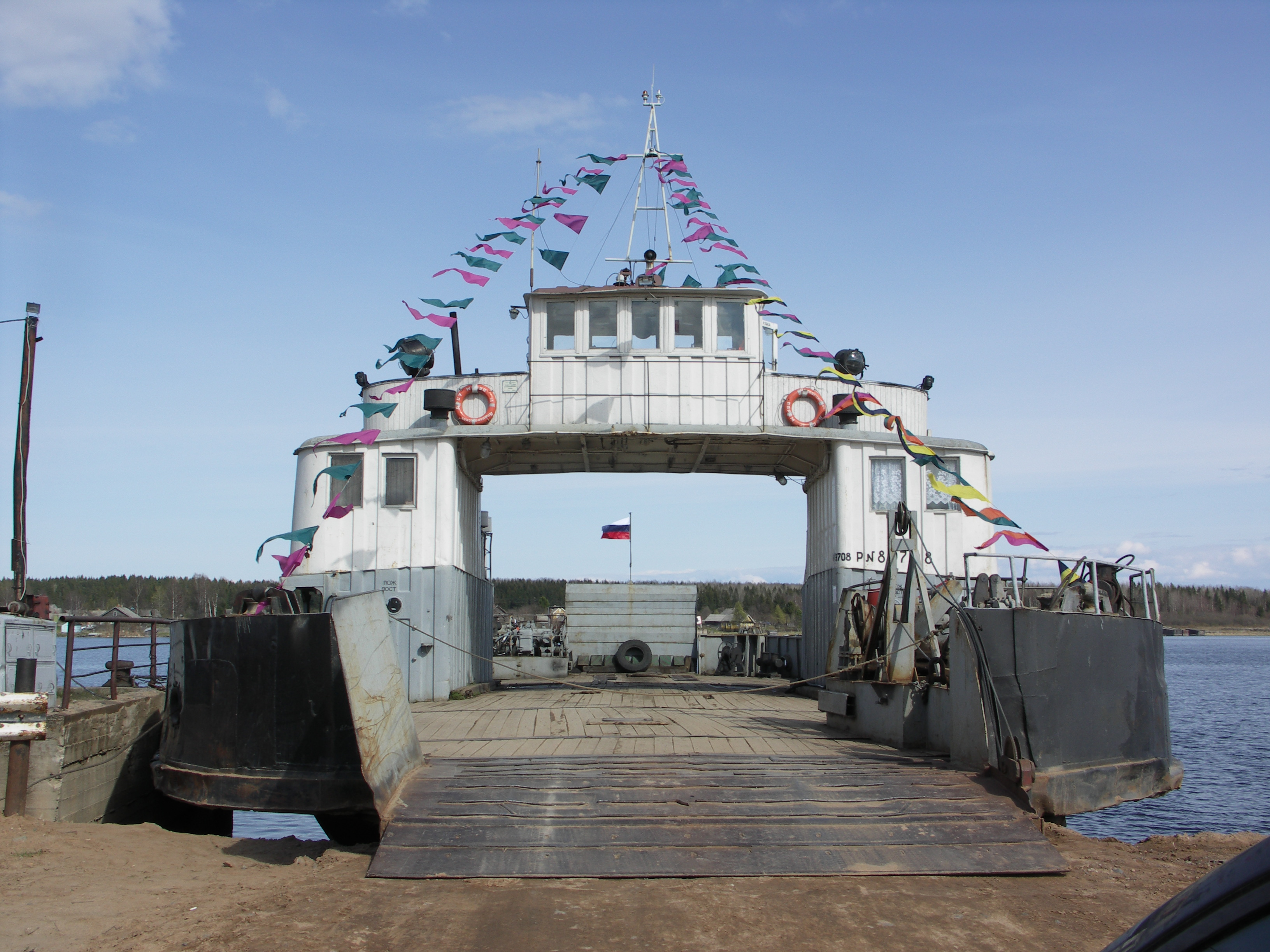 Паром в поселке Вознесенье Подпорожского района Ленинградской области, празднично украшенный ко Дню Победы.